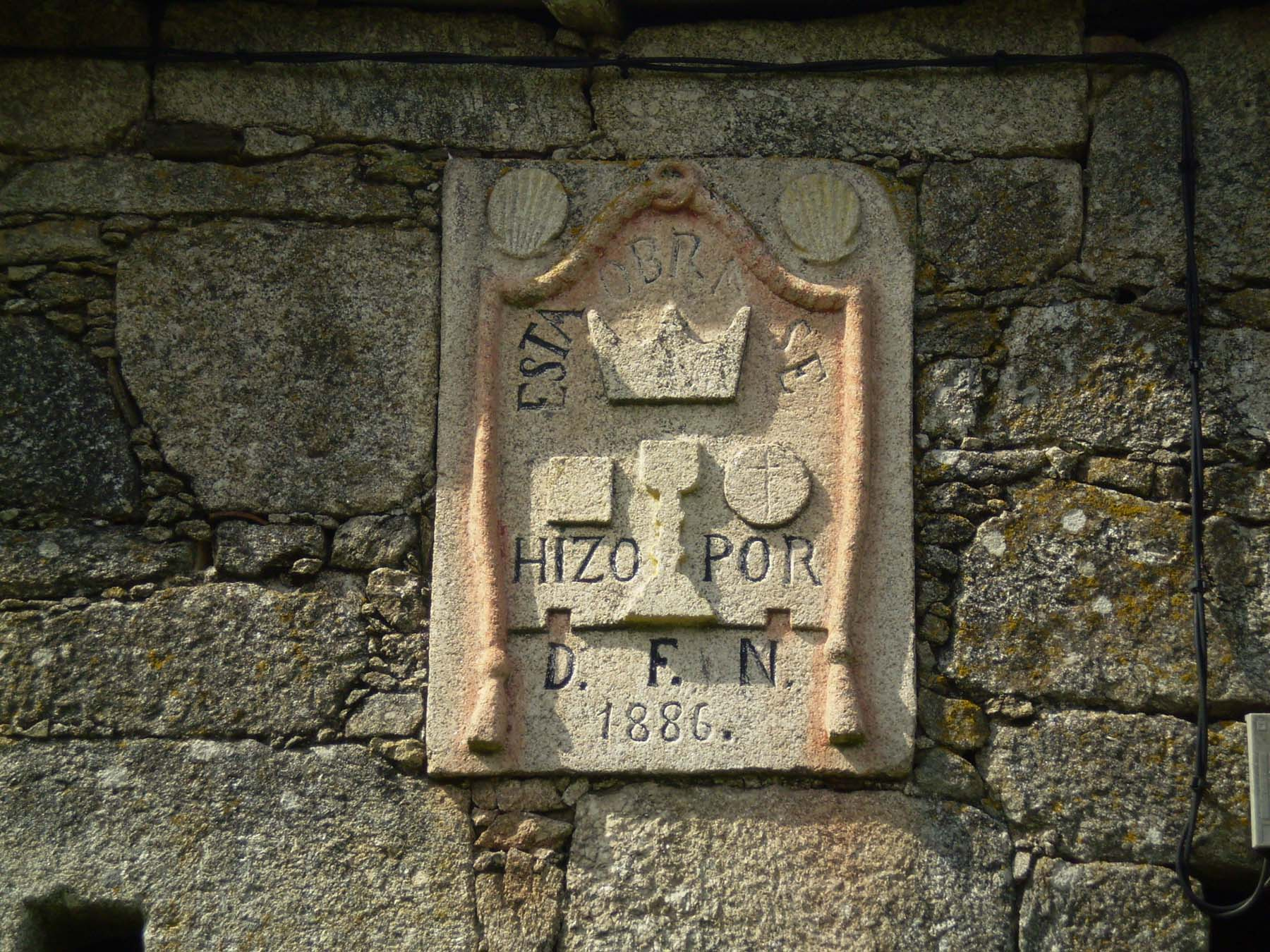 Inscrición na fachada da vivenda sita en Barbalde (Antas de Ulla)